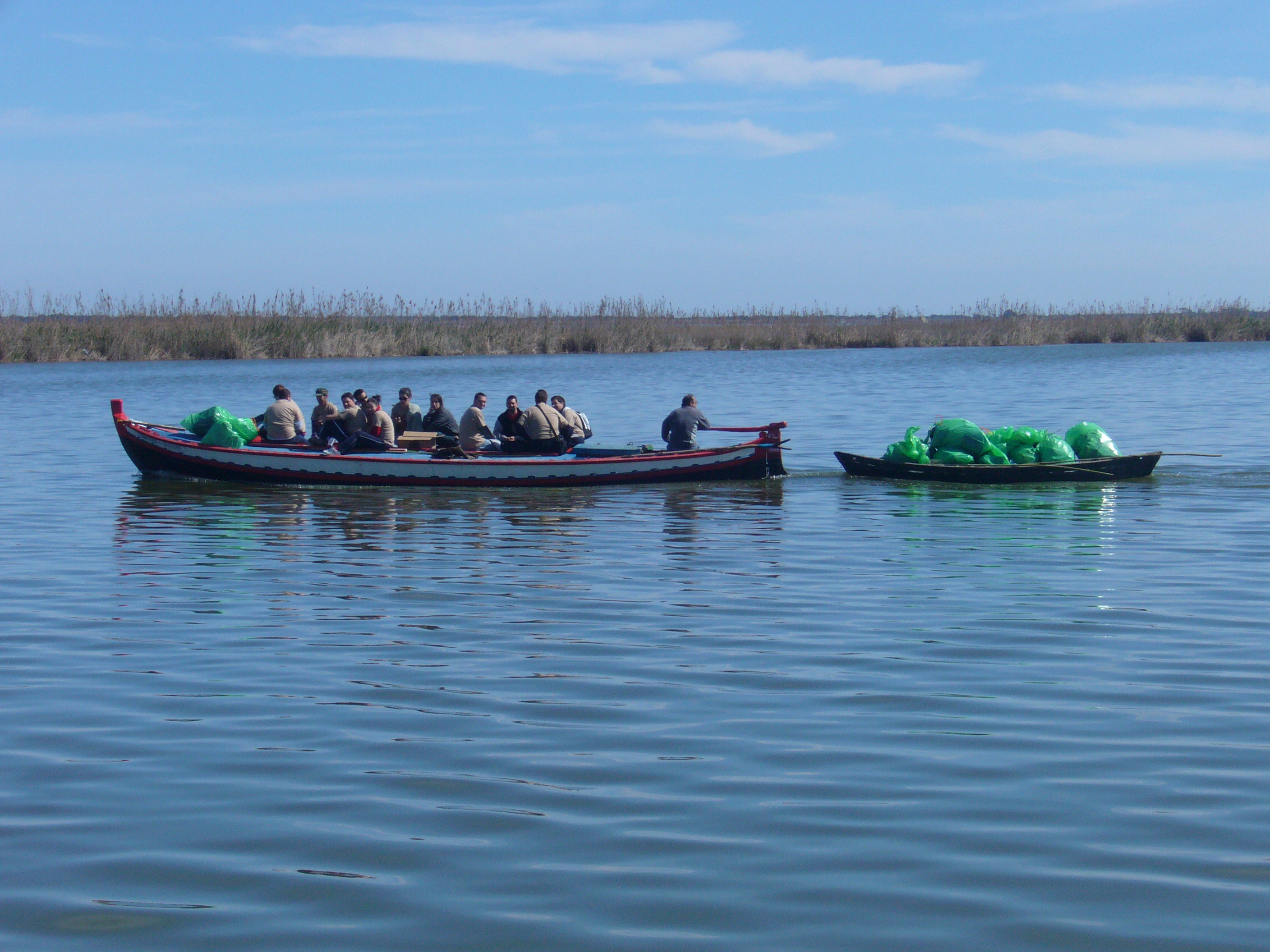 Voluntariat a l'Albufera, treient fem. Horta Neta 2008, des del Port de Silla